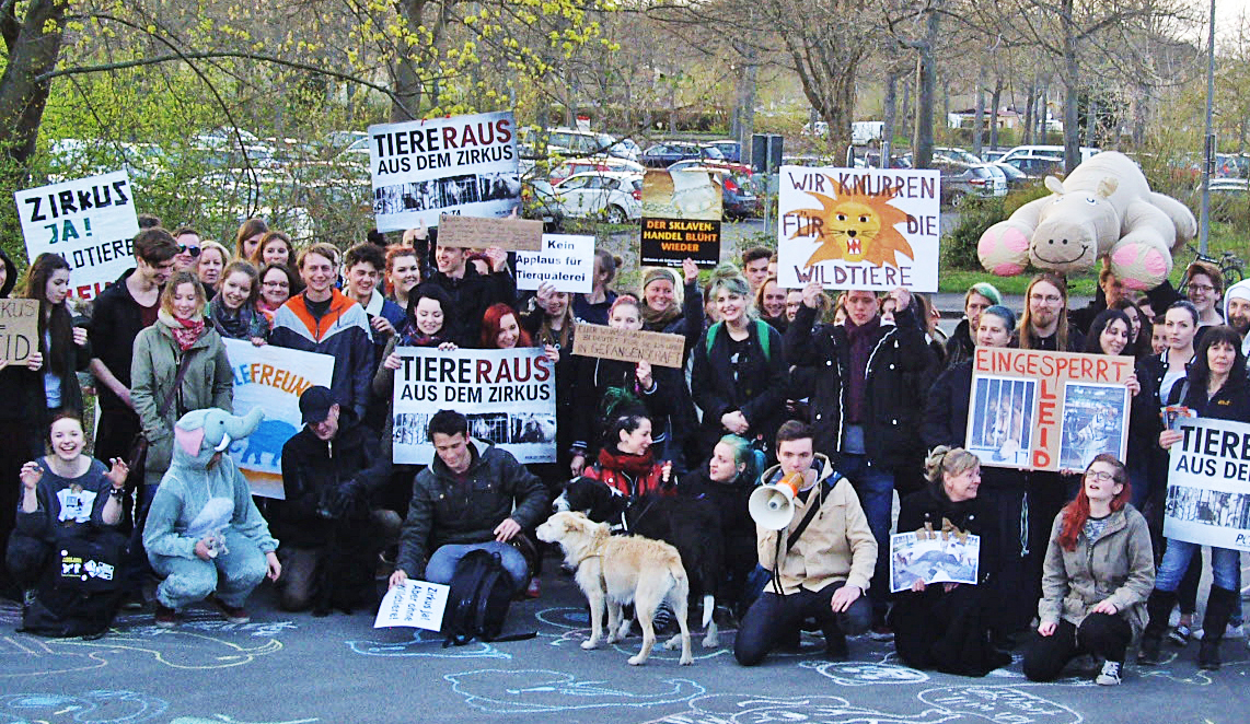 Protest gegen Wildtierhaltung in Zirkussen, vor dem Zirkus Charles Knie auf dem Schützenplatz, Göttingen. Gastspiel 10.-15.4.2015.